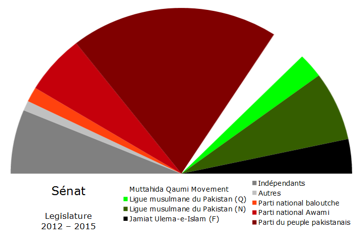 Composition du Sénat à la suite des élections de 2012